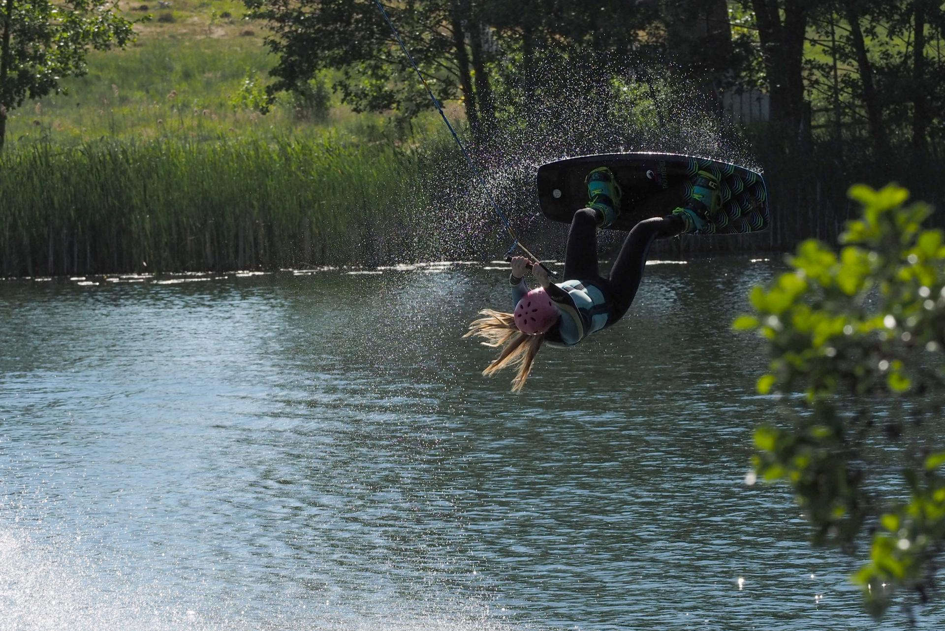 Wakeup na jeziorze Kłodawskim